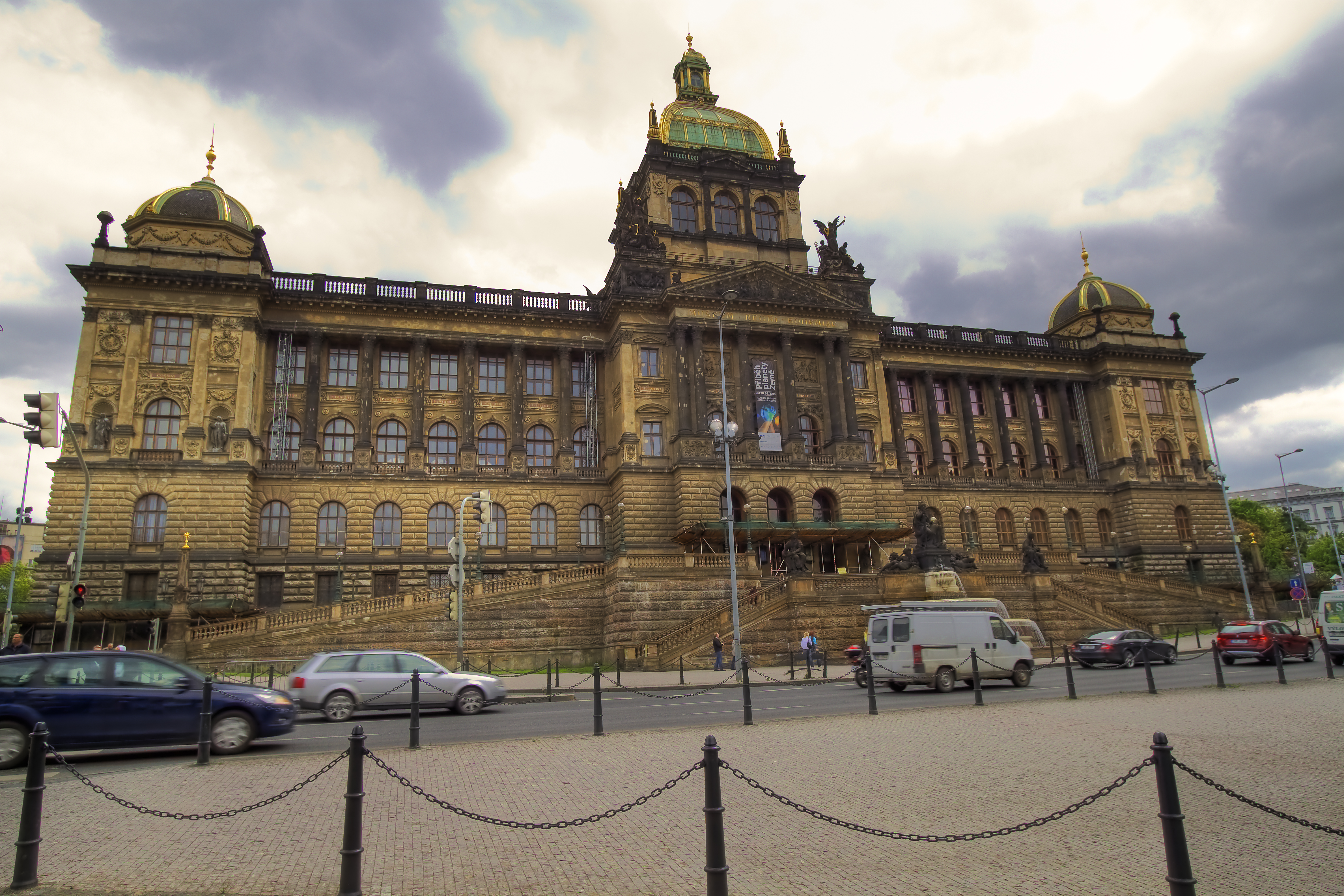 Národní muzeum (Nové Město), Praha 1, Václavské nám., Mezibranská 1700, Nové Město